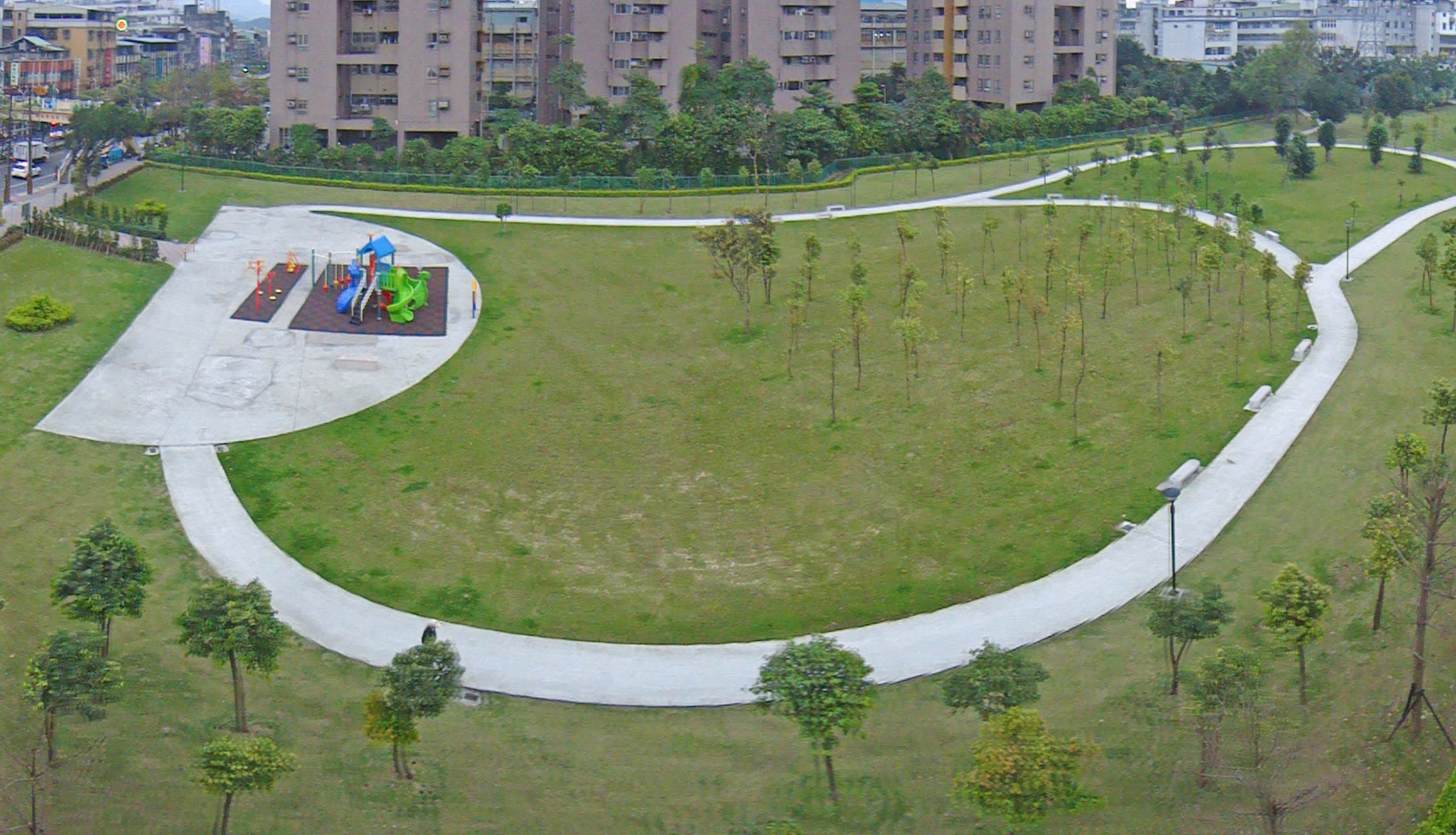 新北市中和區連城路上的公路二村公園